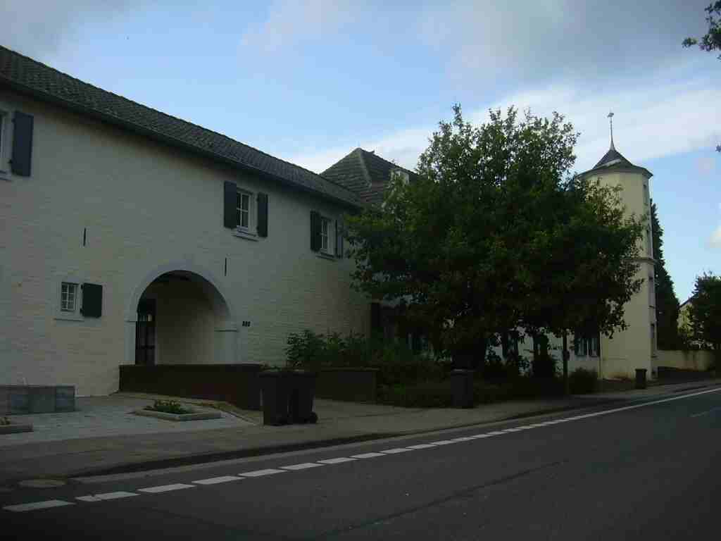 Weiherhof Gürzenich, Straßenansicht Schillingsstr.